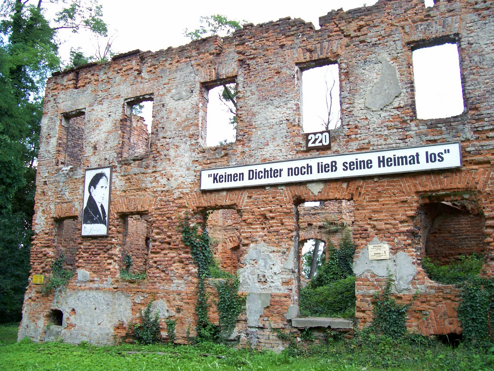 Łubowice: Ruiny pałacu